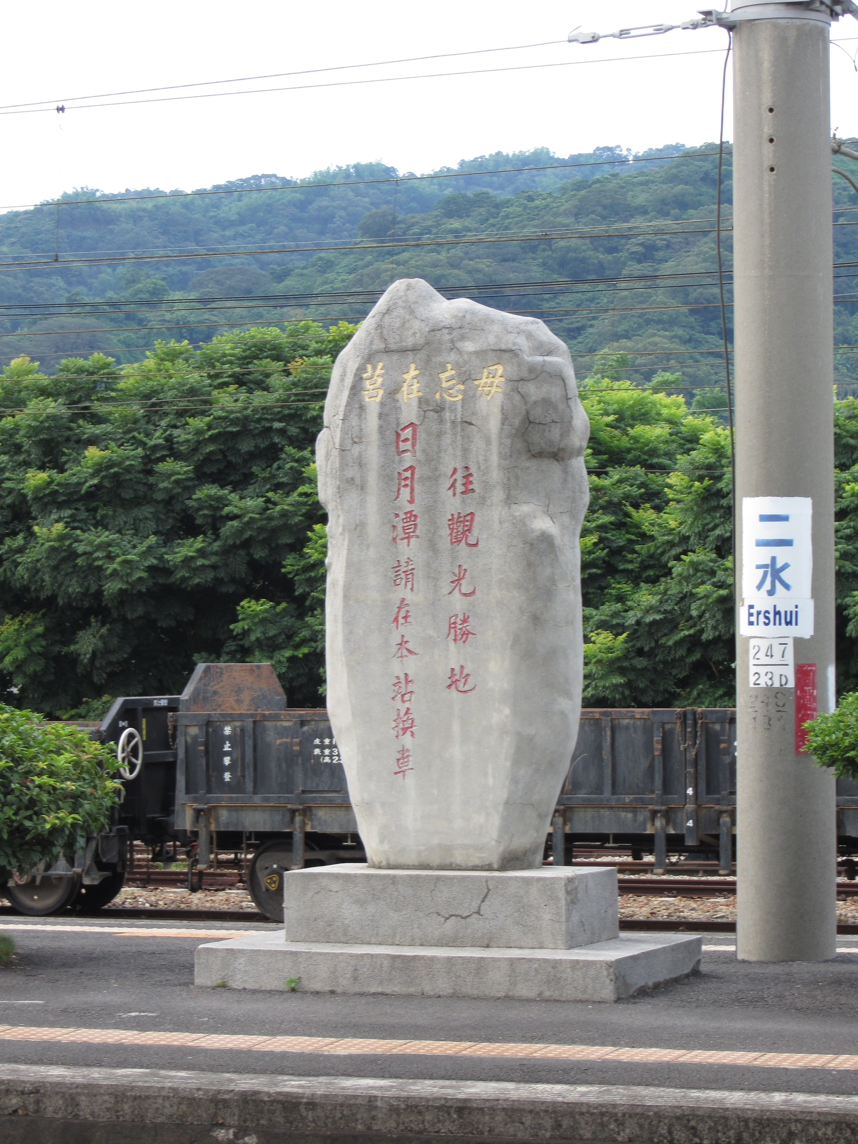 中文（台灣）: 二水車站月台上的「往觀光勝地日月潭請在本站換車」石碑。